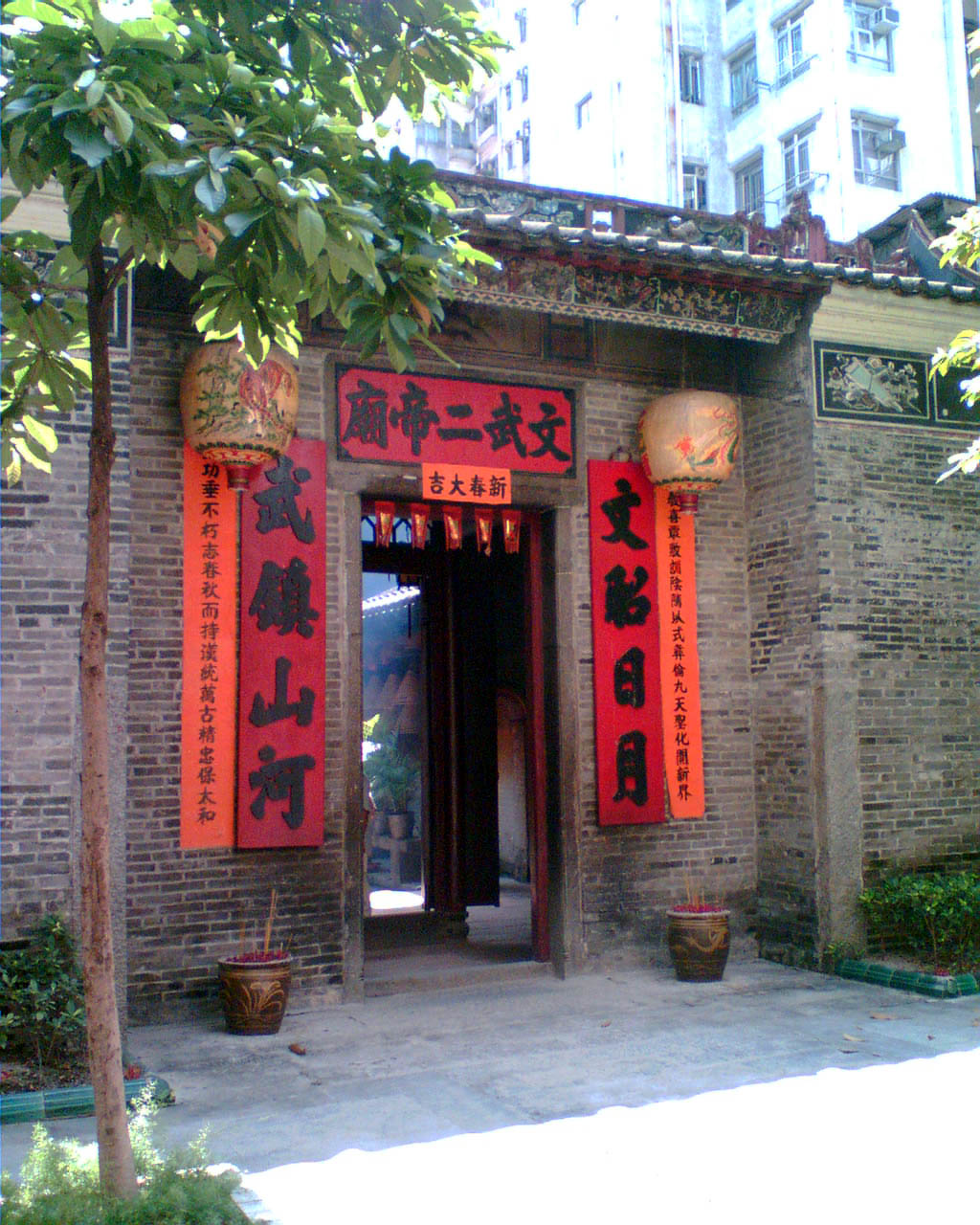 文武二帝廟